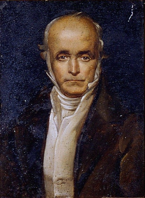 Huile sur métal du XIXe siècle représentant Charles Fourrier. Auteur inconnu, 13 7/8 x 10 in. a appartenu à André Breton. Bibliothèque littéraire Jacques-Doucet, Paris.